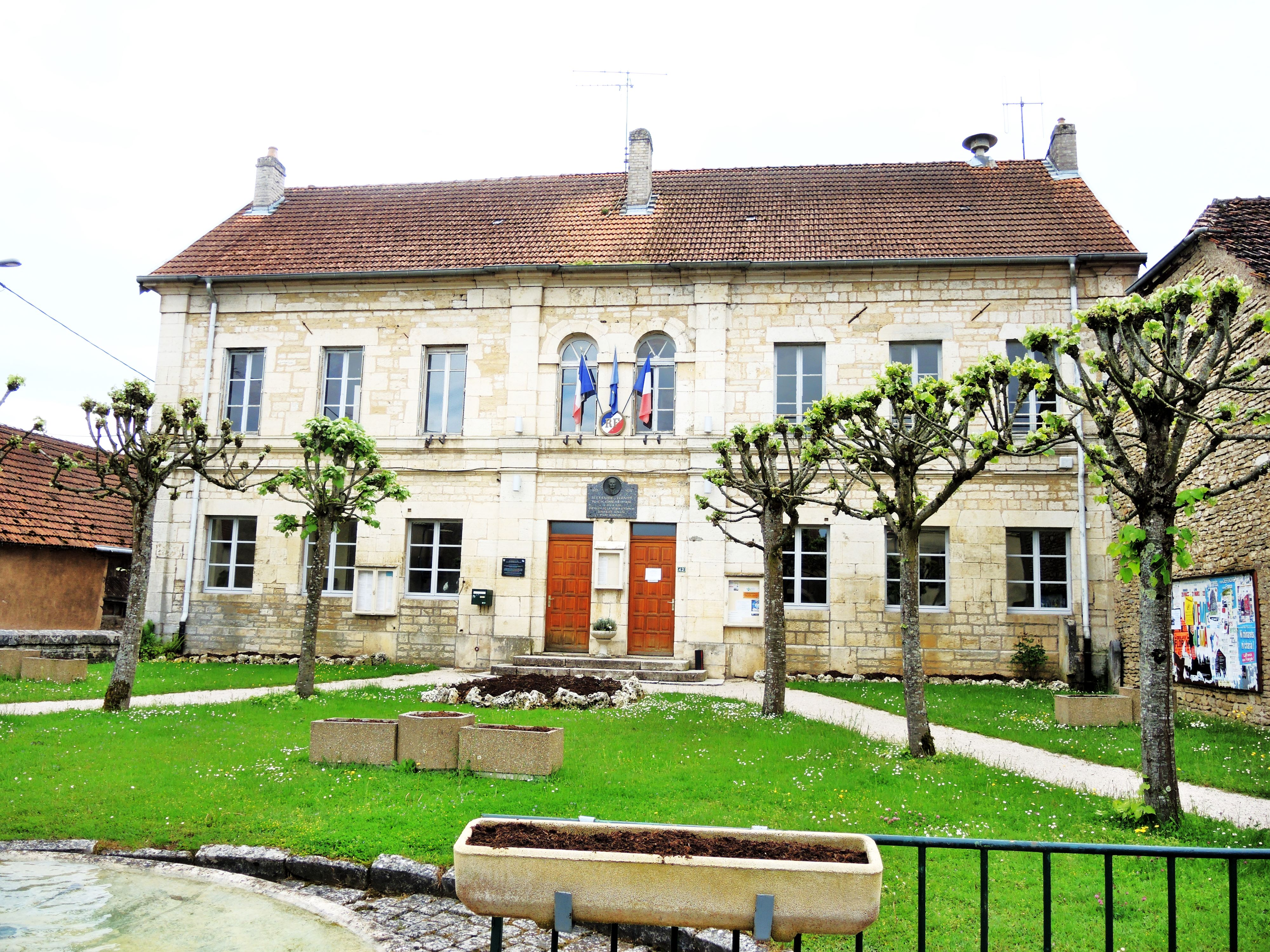 Mairie du village